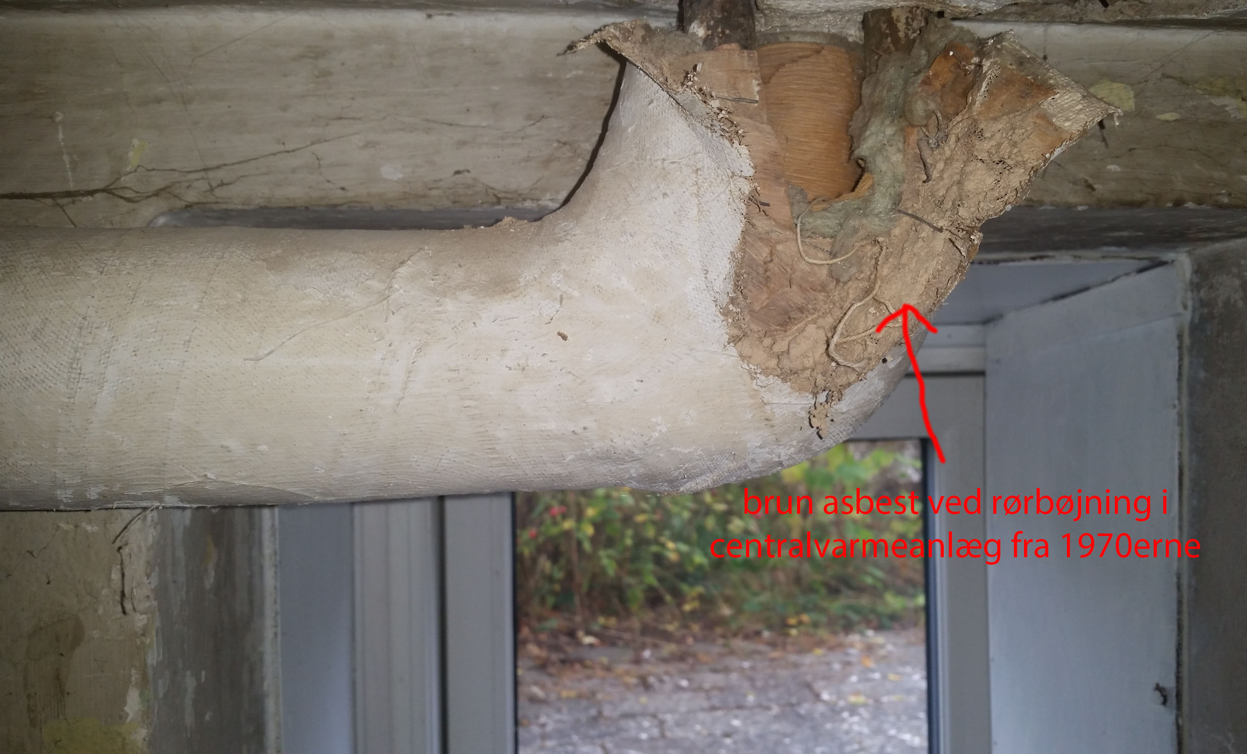 Rørisolering med asbest.